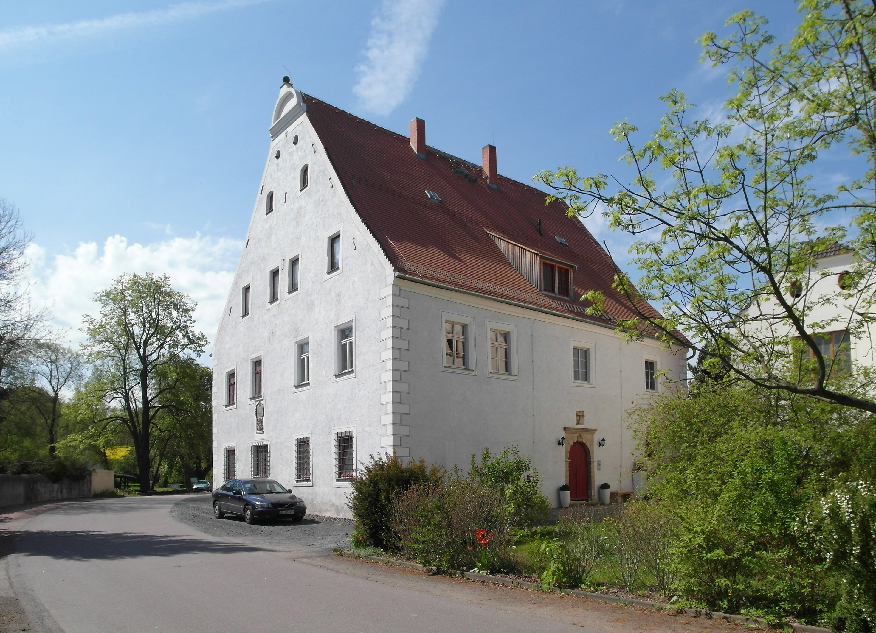 12.05.2017 01665 Niederjahna (Käbschütztal), Dorfstraße 3 (GMP: 51.165124,13.435445): Ehem. Rittergut. Hans von Schleinitz ließ um 1580 das Herrenhaus errichten. Zwischen 1691 und 1693 Umbau unter Hans Dietrich von Miltitz. Nach 1945 bezogen zunächst Flüchtlinge das Herrenhaus. Neubauern gründeten 1952 die erste LPG [Landwirtschaftliche Produktionsgenossenschaft] in Sachsen. In der DDR diente das Herrenhaus als Gemeindeverwaltung, Konsum, Kindergarten sowie als Nähstube. Die Gemeindeverwaltung zog 1996 aus. Heute Privatbesitz. Von 2010 bis 2013 denkmalgerecht saniert. Sicht von NO. [SAM9720.JPG]20170512125DR.JPG(c)Blobelt